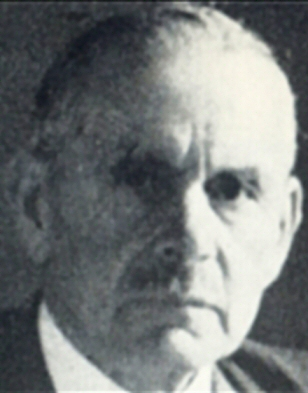 John Miller Andrews (* 17. Juli, 1871 in Comber, Nordirland; † 5. August, 1956 in Comber) war der zweite Premierminister Nordirlands.